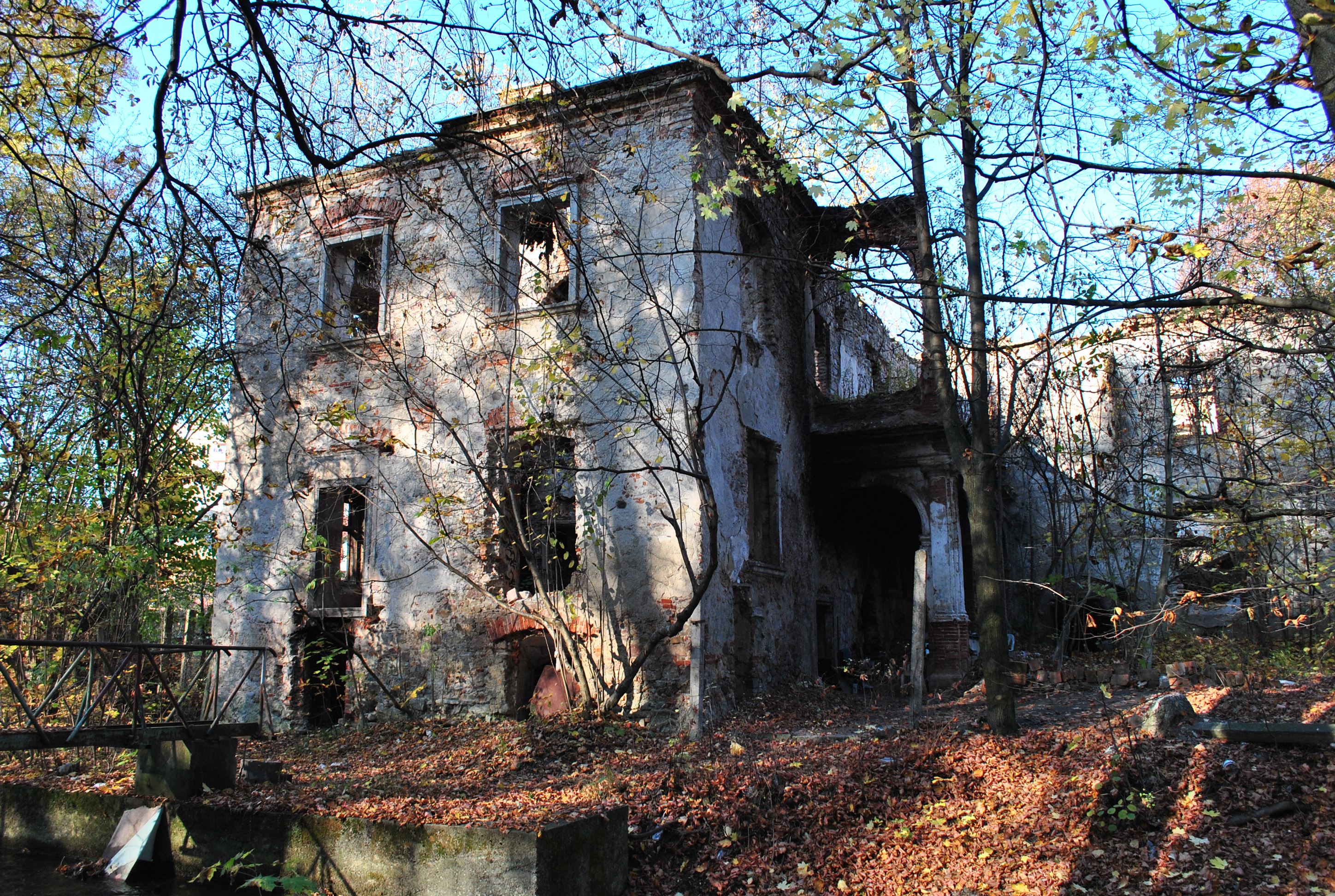 Kaštiel